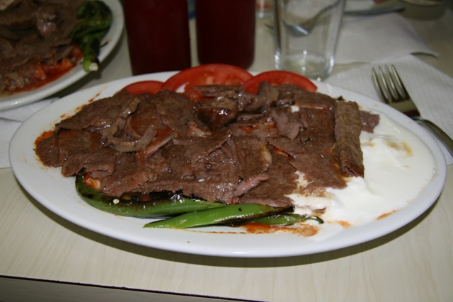 Picture taken in Bursa, in the restaurant Kebabçı İskender oğlu Cevat, by Lakerda.